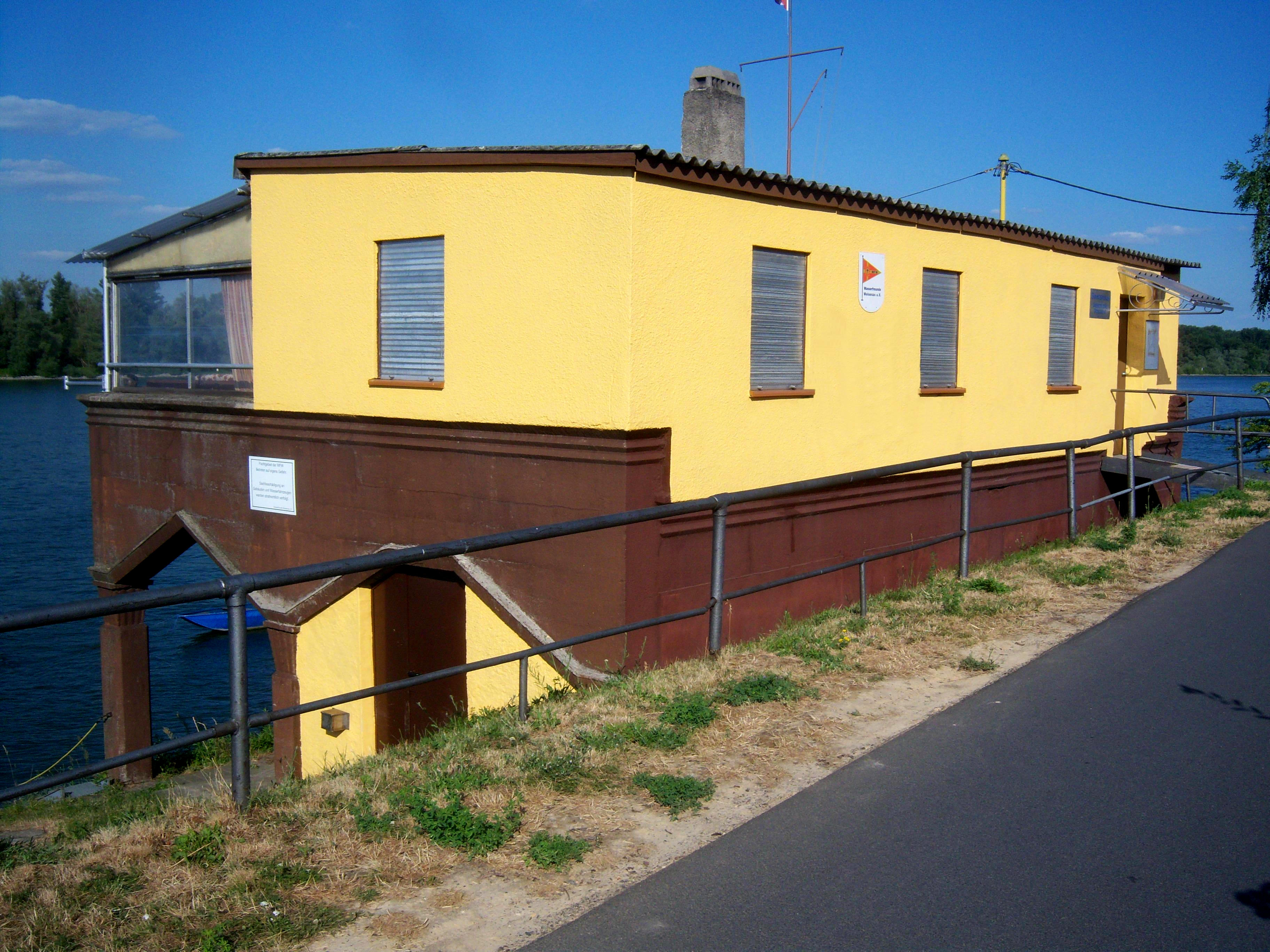 Vereinsheim der Wasserfreunde Weisenau e. V. in der Wormser Straße in Mainz-Weisenau in Rheinland-Pfalz (Deutschland)